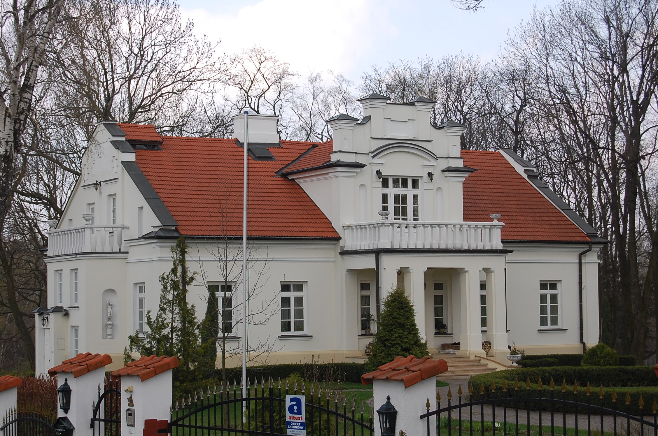 Dworek barona Karola Boksendera w Motyczu